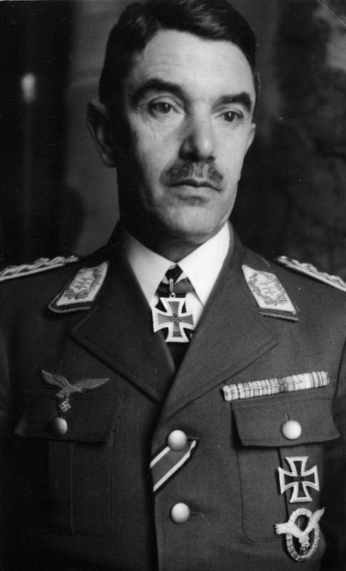 Alexander Löhr Scherl Bilderdienst Löhr, Alexander; General der Flieger, Luftflotte 4, 1939 Bildberichterstatter Wilhelm Sturm, Wien, IV, Operng.23/21 13757-39 [Alexander Löhr, General der Flieger, mit dem am 30.9.1939 verliehenen Ritterkreuz des Eisernen Kreuzes] Abgebildete Personen: Löhr, Alexander: General der Flieger, Ritterkreuz (RK), Luftwaffe, Österreich (GND 124788343)